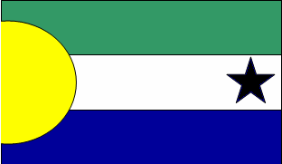 Bandera del Municipio Mara, estado Zulia, Venezuela